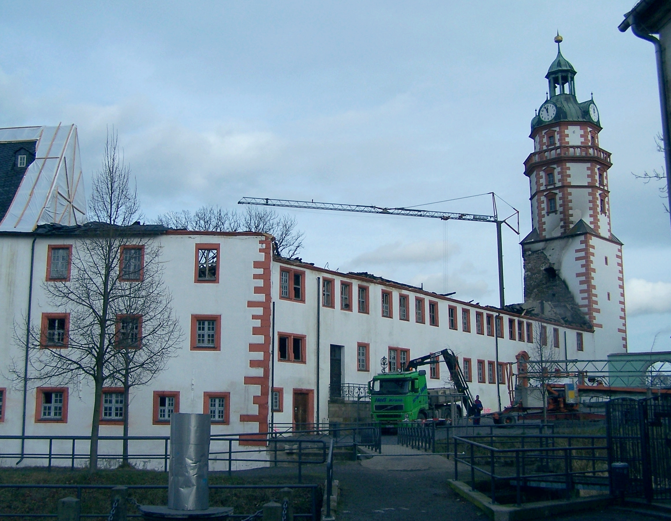 Aufbau eines zweiten Kranes am ausgebrannten Westflügel von Schloss Ehrenstein in Ohrdruf.